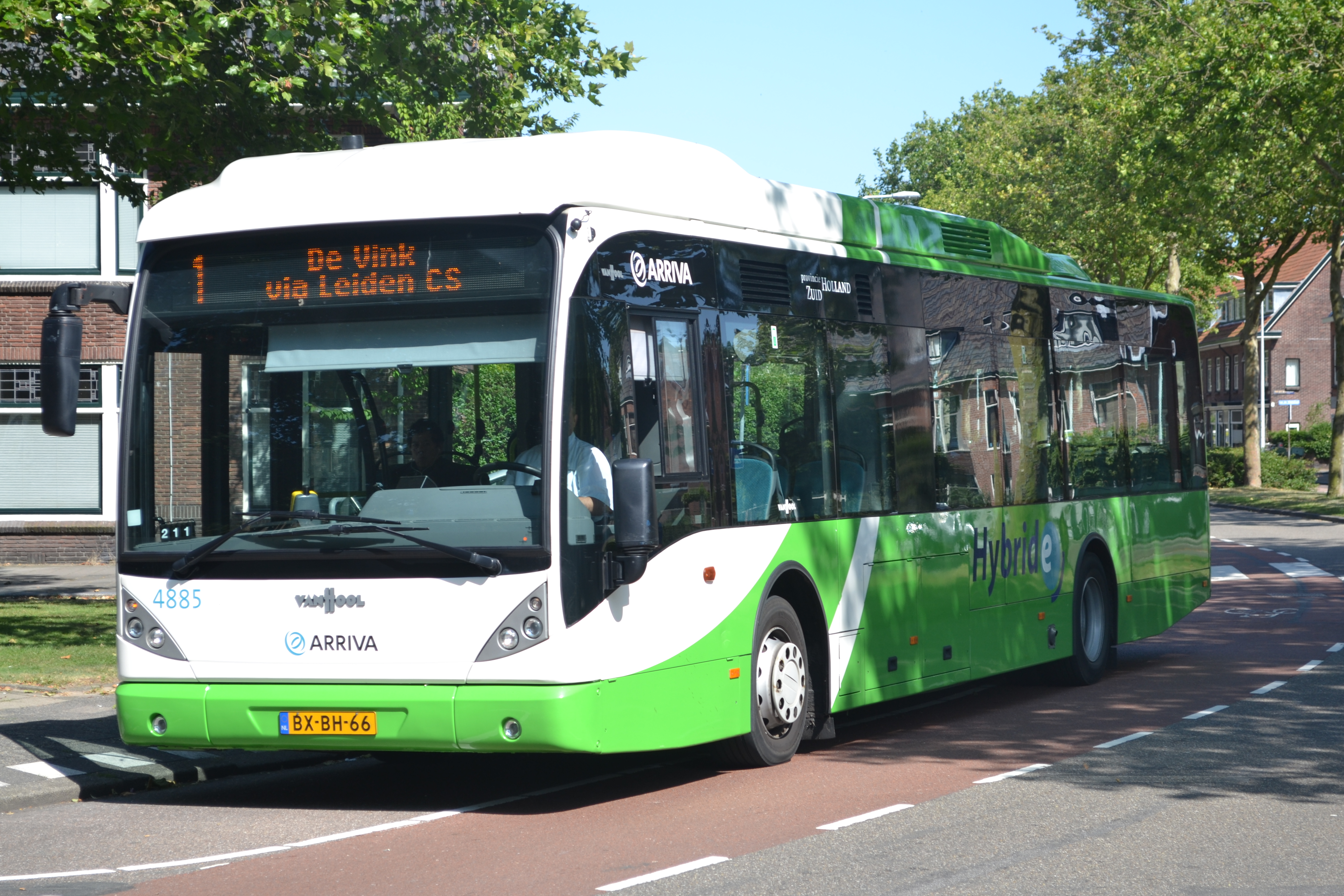 Arriva 4885, een Leidse Van Hool Hybride, als lijn 1 naar station De Vink op de De Sitterlaan bij station Leiden Lammenschans.